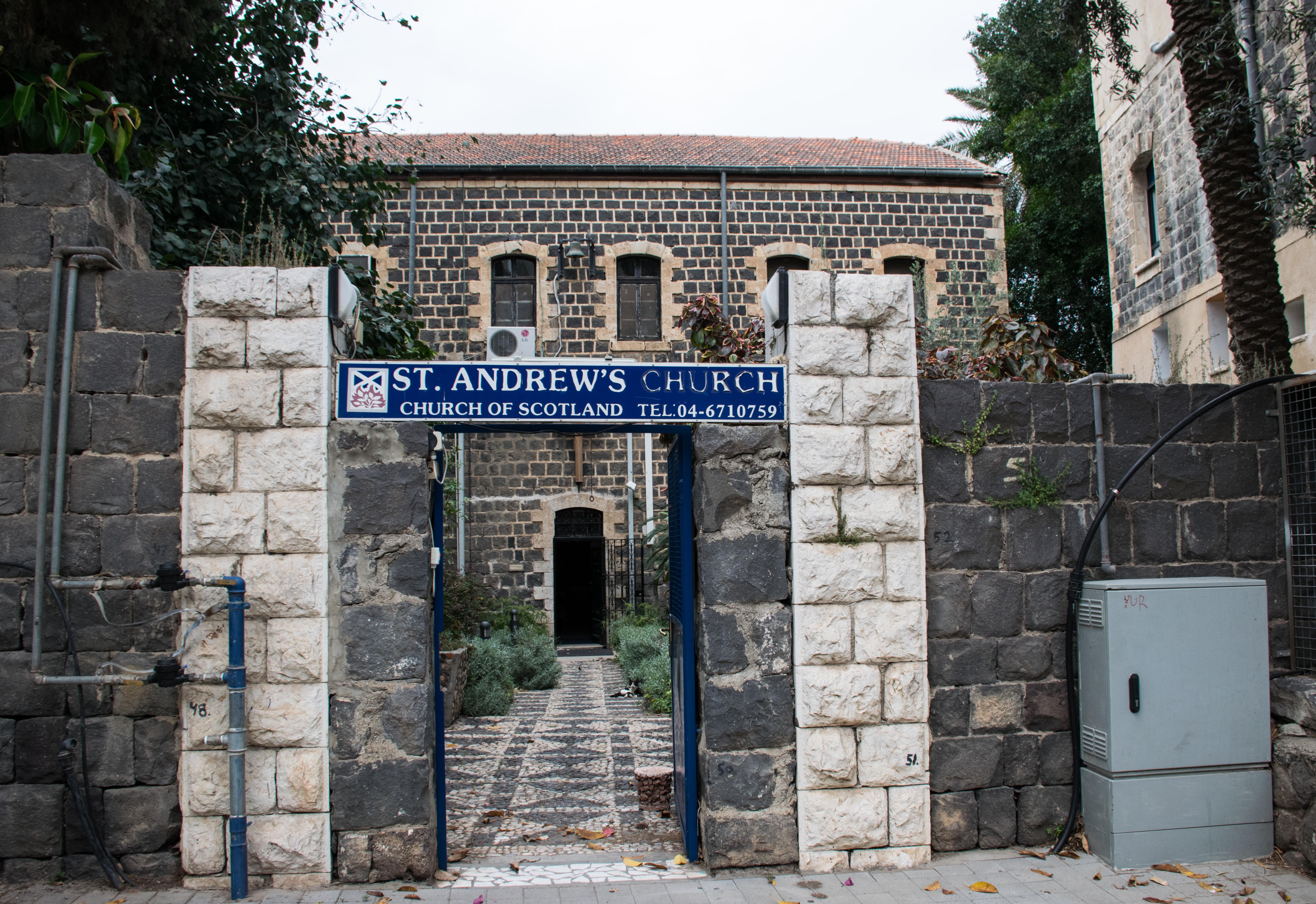 DSC_1627.jpg Tiberias